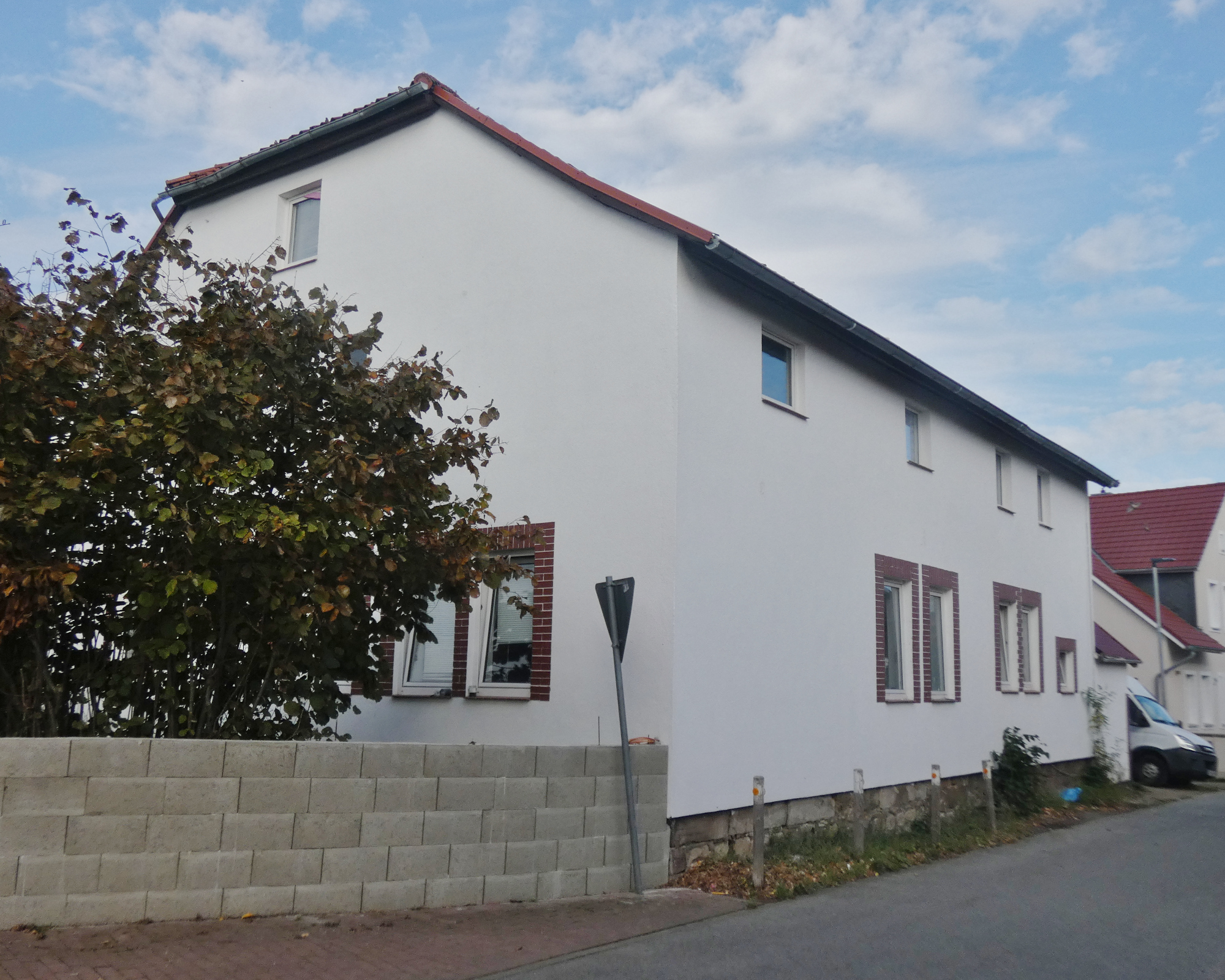 Das Schulhaus wurde ab 1825 für die Dörfer Linderte und Vörie errichtet und von 1912 bis 1919 umgebaut. 1966 wurde die Schule geschlossen. Das Gebäude diente danach als Verwaltungsnebenstelle und wurde 1986 verkauft und nach 2014 renoviert.